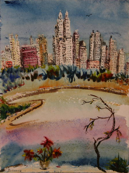 NY Central Park, Gouache auf Papier, gemalt von Soshana, 1975